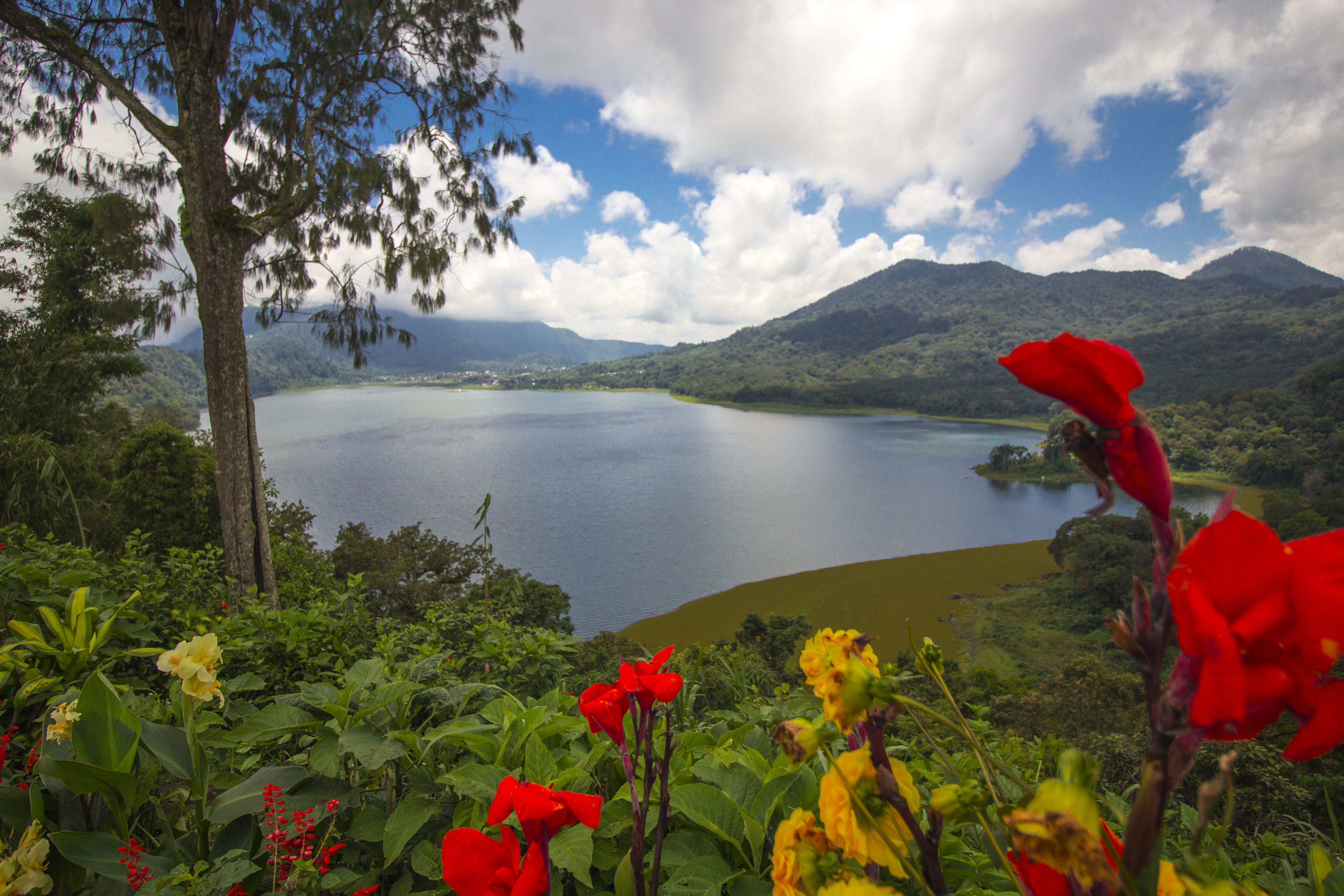 Danau buyan adalah danau terluas yang berada di kawasan bedugul. foto diambil dari sisi barat ke arah sudut timur.